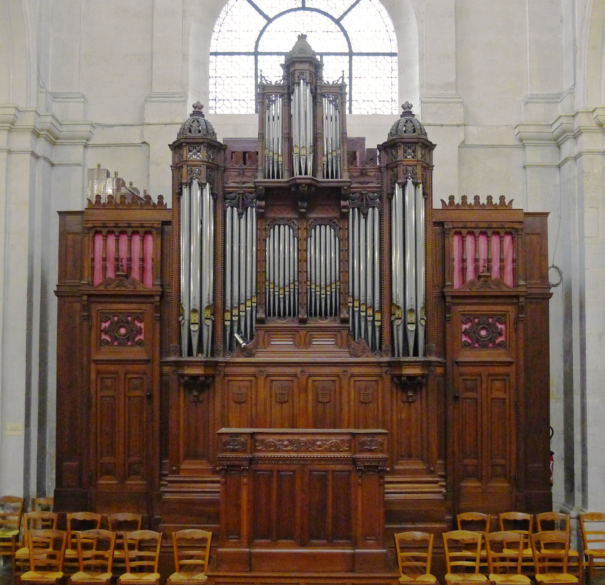 Église Saint-Jacques-du-Haut-Pas (orgue de chœur) - Paris V Instrument Cavaillé-Coll de 1866